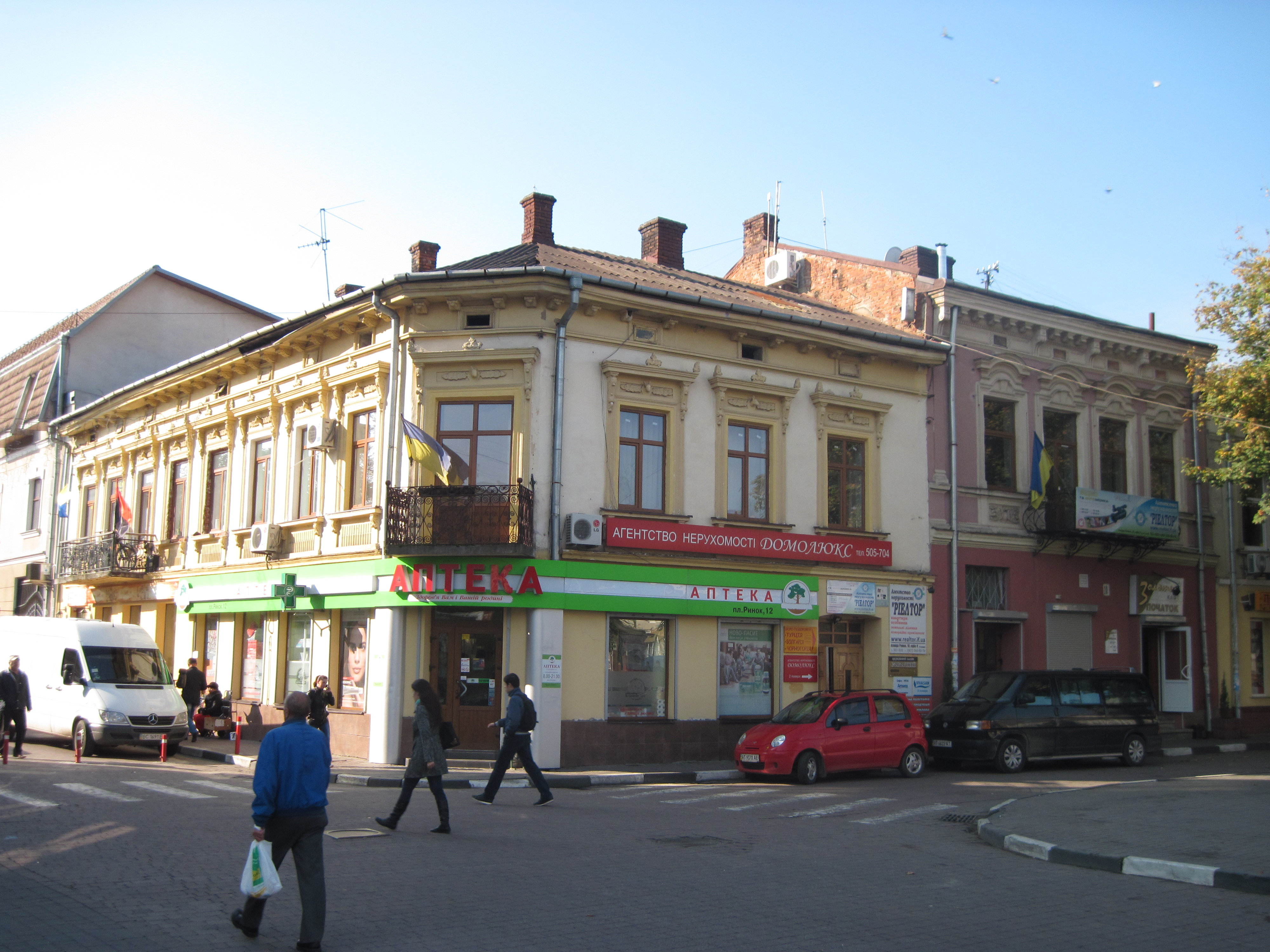 Будинок, неподалік площі Ринок, Франківськ